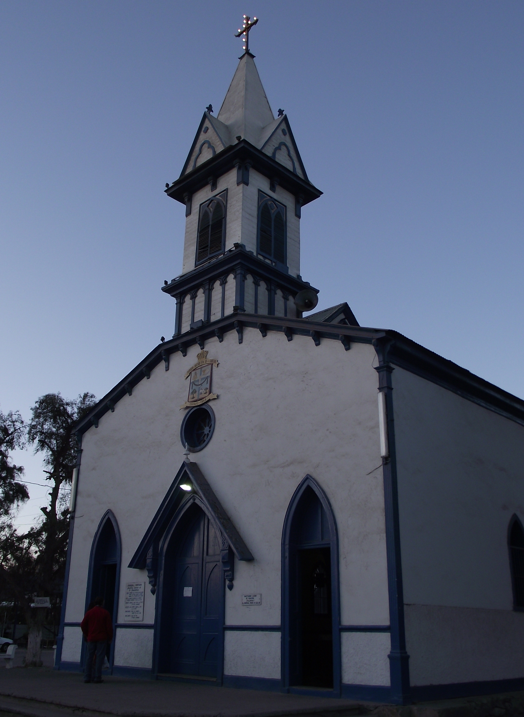 Iglesia de Nuestra Señora de La Candelaria, en Copiapó.